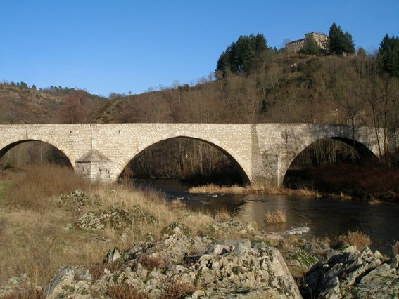 Le Pont du Roi